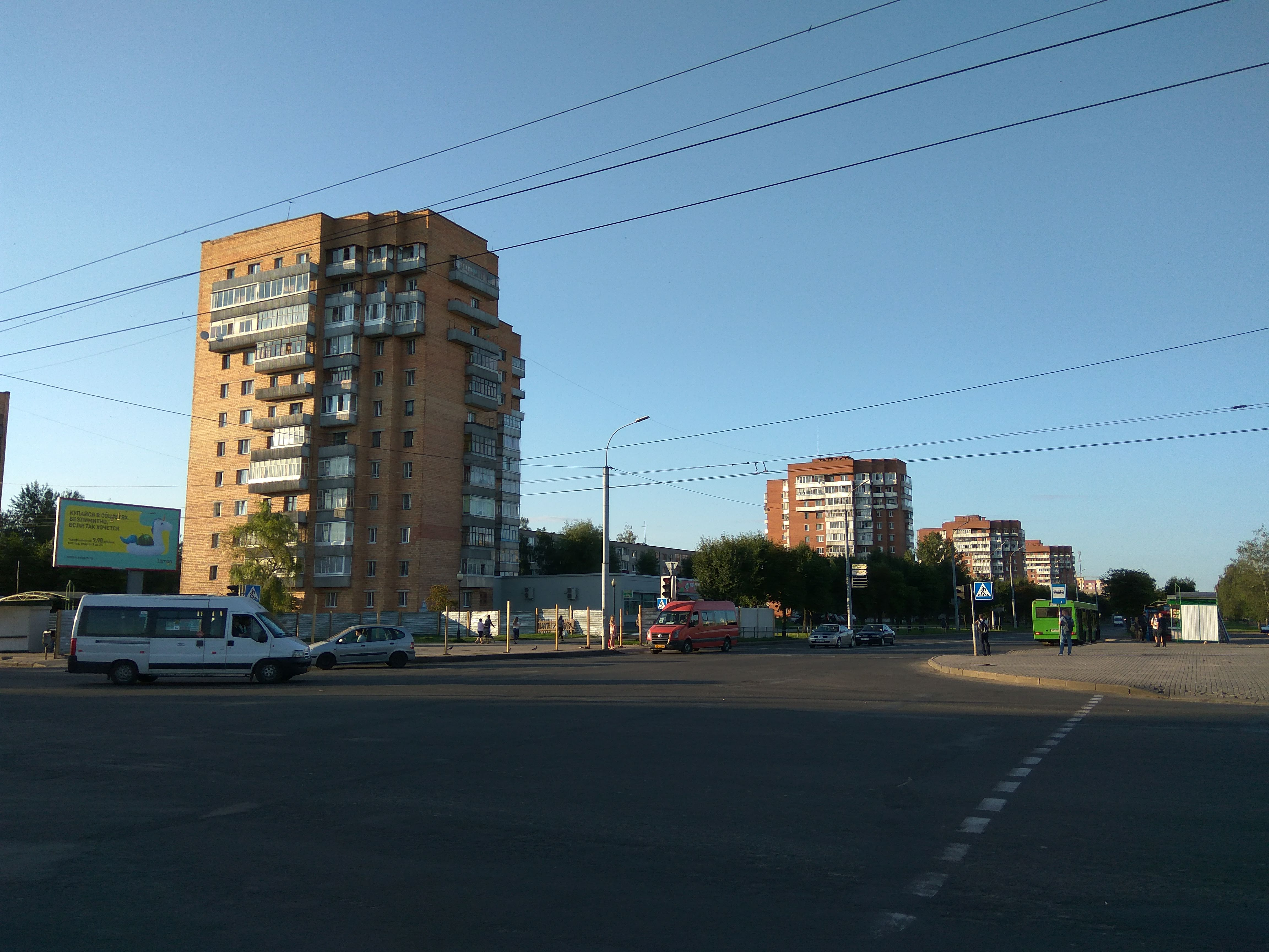 Магілёў. Вуліца Астроўскага